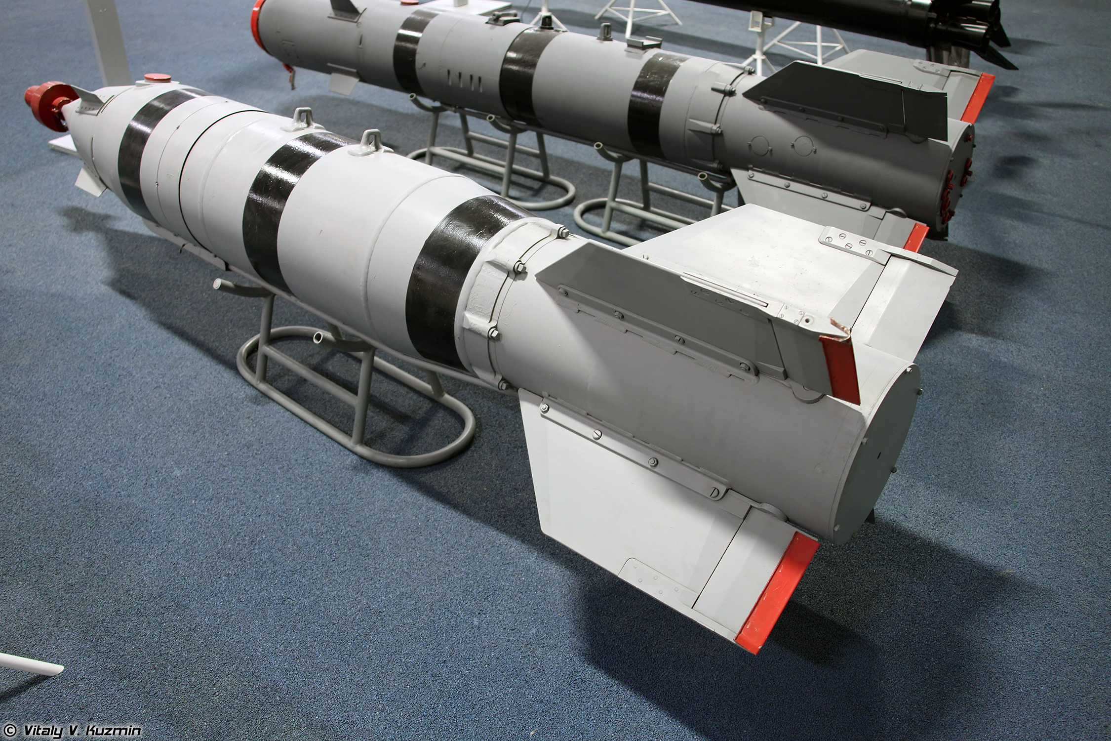 Корректируемая авиационная бомба КАБ-500Л